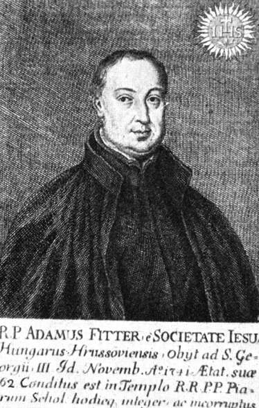 Fitter Ádám bölcseleti és teológiai doktor, jezsuita rendi pap és akadémiai rektor.